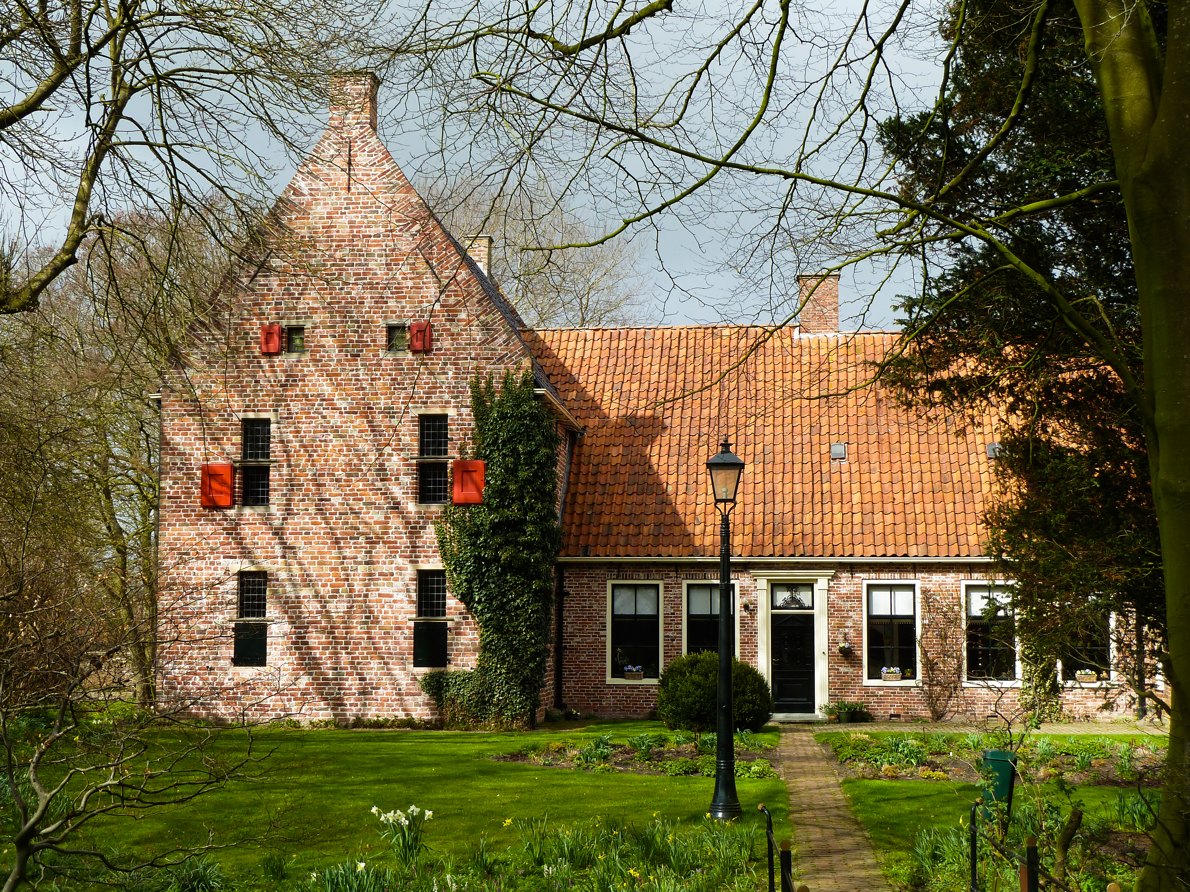 Weem Helmantel - zijaanzicht